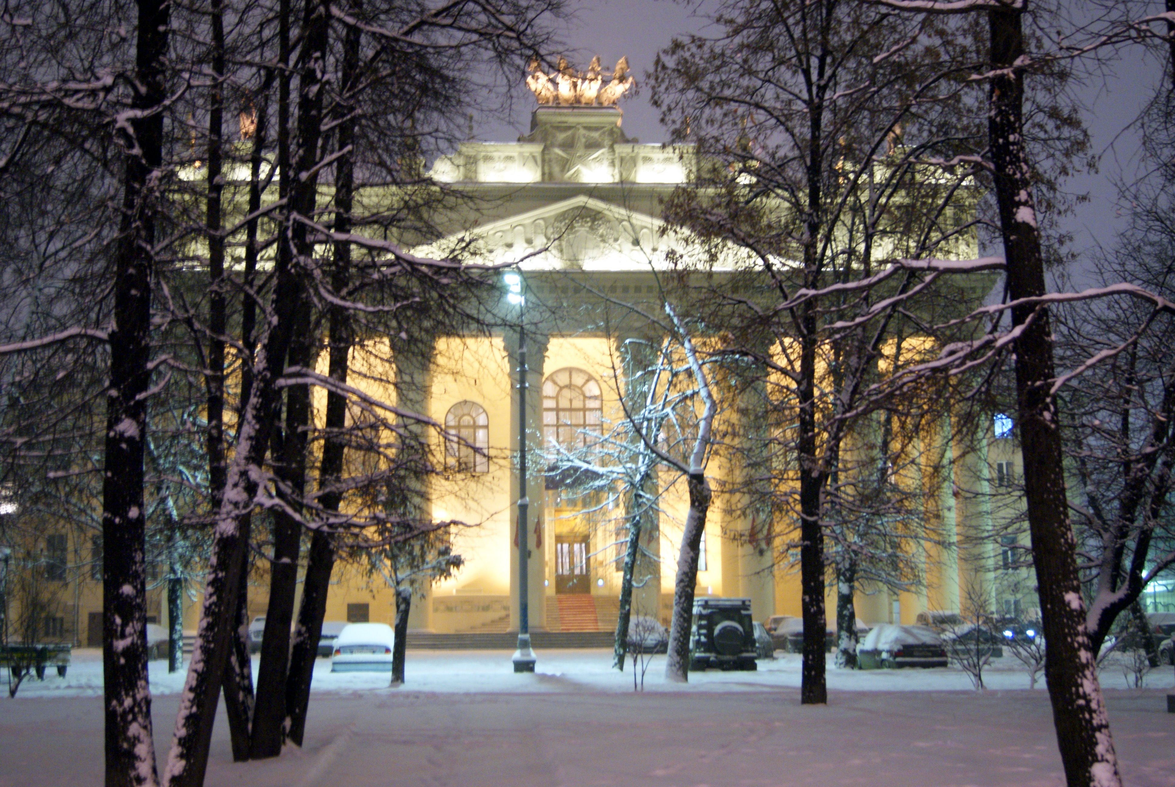 Центральный Московский ипподром